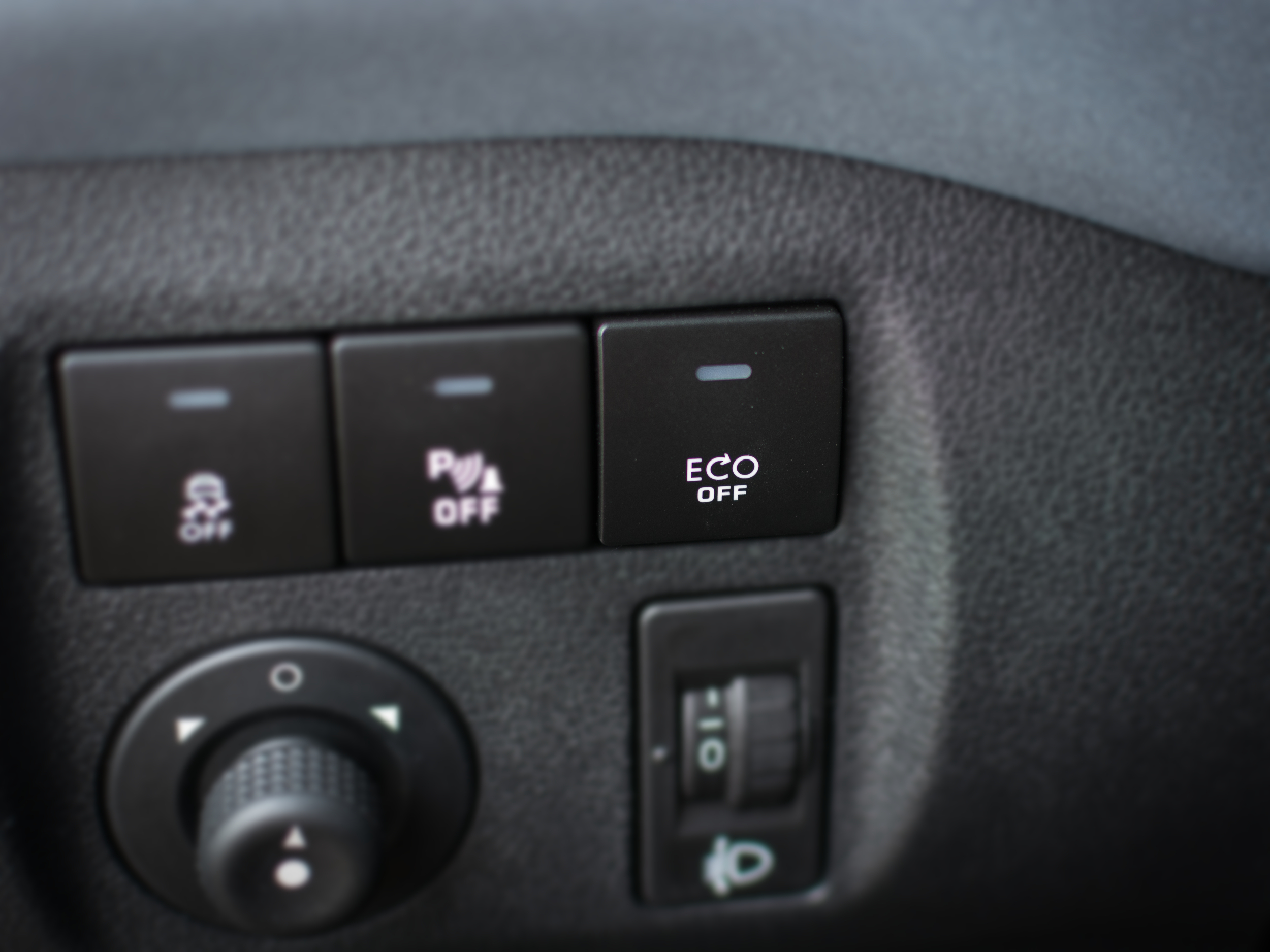 Taster zum Aus- und Einschalten des Start-Stopp-Systems an einem Citroen Berlingo 1,6 eHDi.